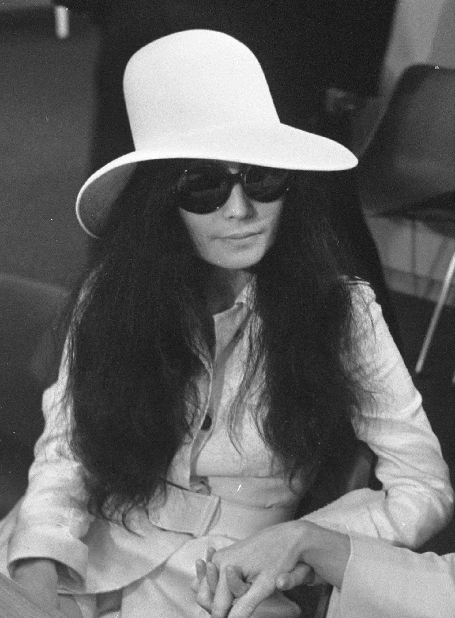 Collectie / Archief : Fotocollectie Anefo Reportage / Serie : [ onbekend ] Beschrijving : John Lennon en echtgenote Yoko Ono vertrekken van Schiphol naar Wenen in de vertrekhal Datum : 31 maart 1969 Locatie : Noord-Holland, Schiphol Trefwoorden : echtparen, huwelijksreizen, musici, vliegvelden, zangers Persoonsnaam : Lennon, John, Ono, Yoko Fotograaf : Evers, Joost / Anefo Auteursrechthebbende : Nationaal Archief Materiaalsoort : Negatief (zwart/wit) Nummer archiefinventaris : bekijk toegang 2.24.01.05 Bestanddeelnummer : 922-2499